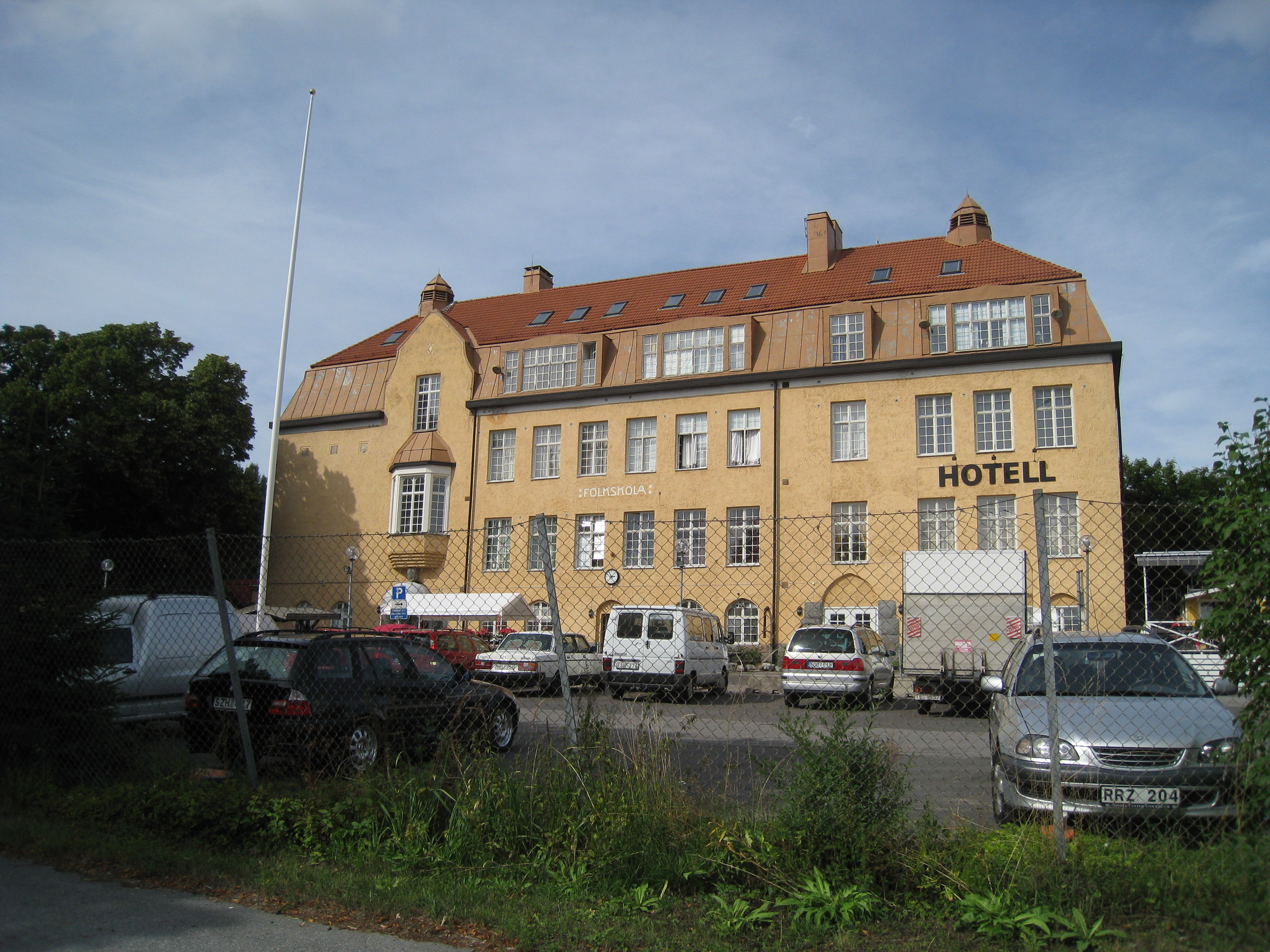 Bällstalunds folkskola i Bromma, byggd 1912, Bällstavägen 100, korsningen Travbanevägen-Bällstavägen, nu hotell för Maranataförsamlingen i Stockholm.